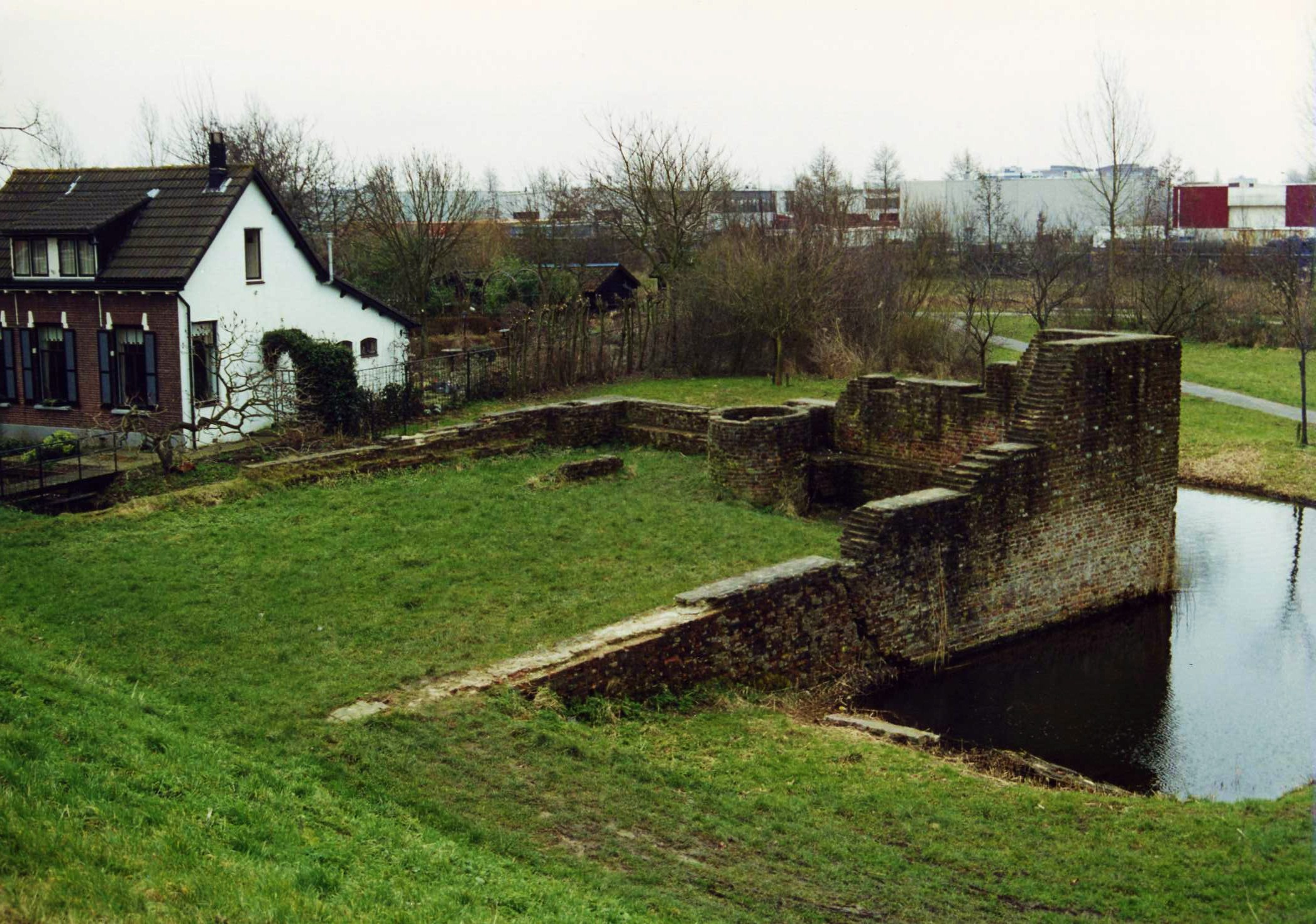 De kasteelruïne van het huis te Woude te Ridderkerk.